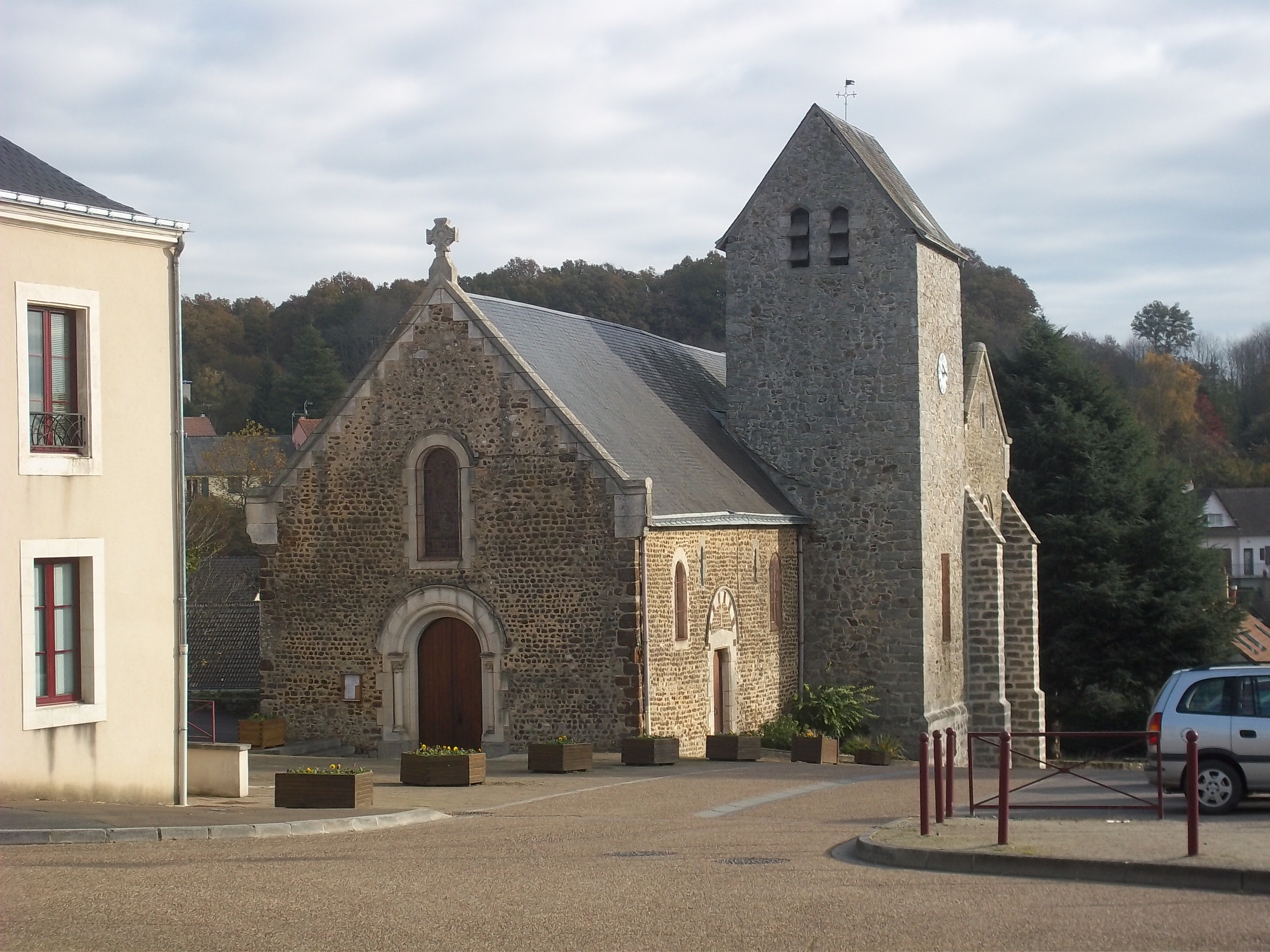 Eglise de la commune